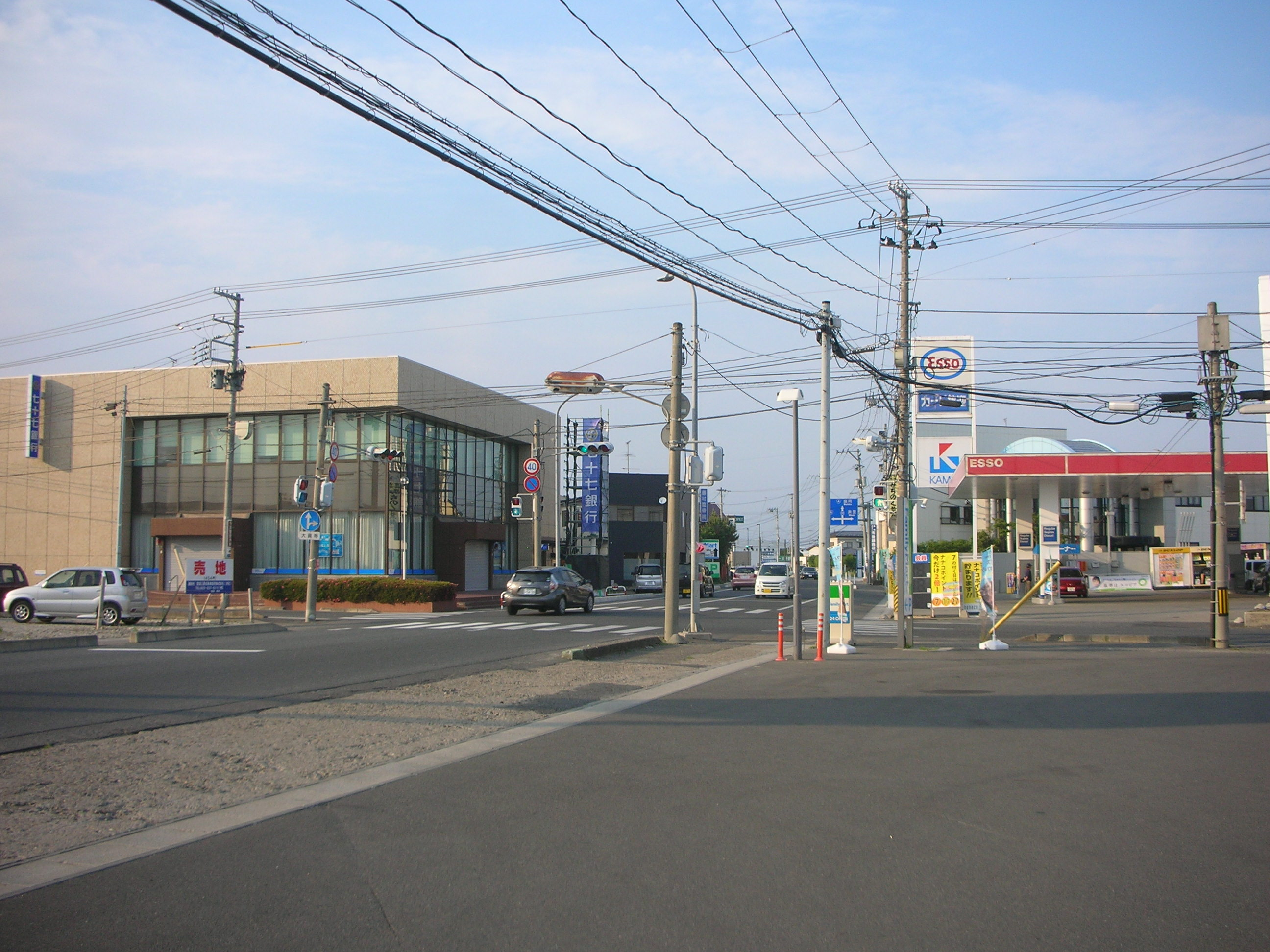 古川 旧国道4号線